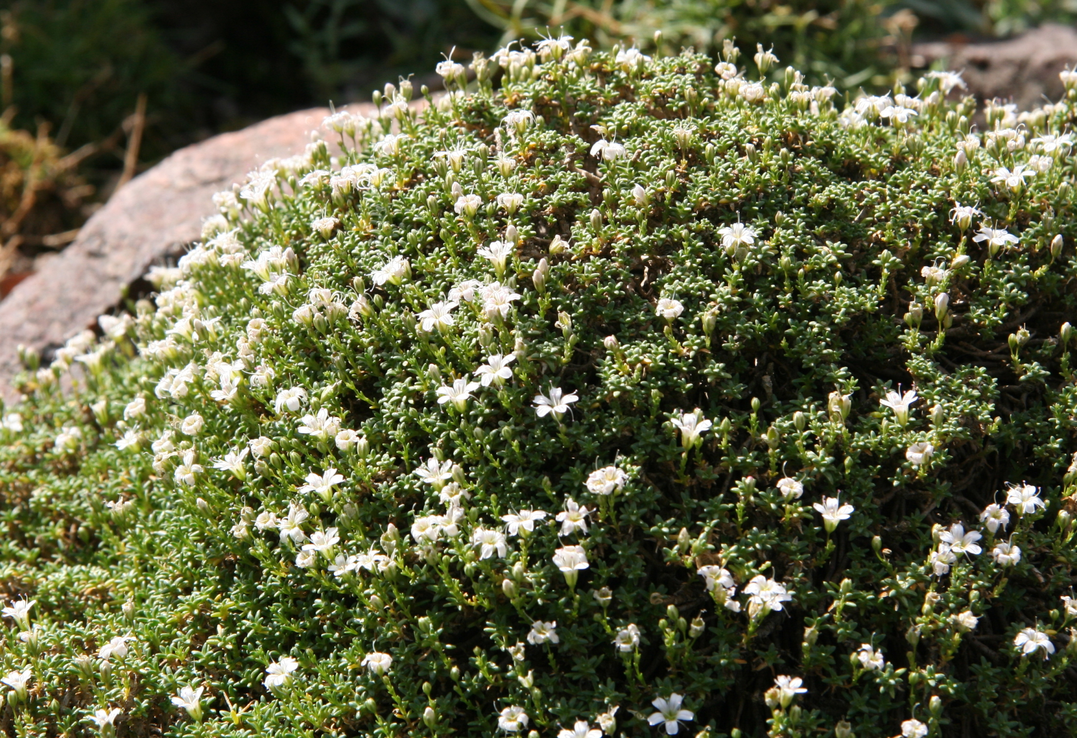 Gypsophila aretioides im Botanischen Garten Dresden